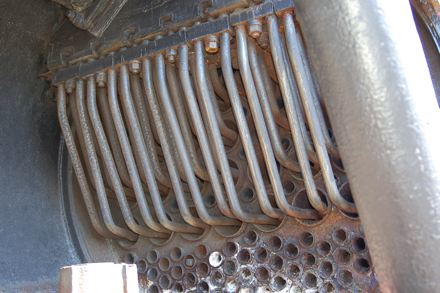 TKt48-179 locomotive in Skansen Parowozownia Kościerzyna